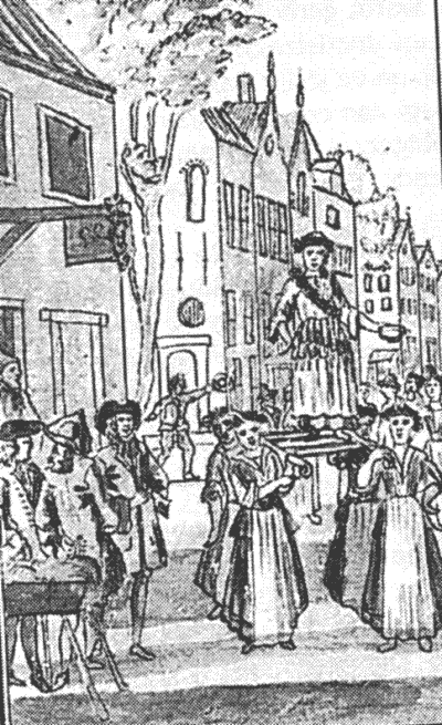 De Pinksterblom van Schermerhorn is een afbeelding bij handschriften van Andries Schoemaker (1660-1735) over een bezoek aan aan Schermerhorn in nl:1718. De auteur van de afbeelding is mogelijk Schoemaker zelf of Cornelis Pronk (1691-1759), maar wellicht ook een andere kunstenaar uit die tijd. Het origineel van deze afbeelding is te vinden op en maakt deel uit van een informatieve website over de Mijzenpolder en Schermereiland (Eilandspolder) van dhr. Dick Mantel, de secretaris van de oudheidkundige vereniging 'Het Schermereiland'. LET OP: Deze afbeelding wordt nog even gebruikt bij een bugreport over de software die de verkleiningen naar "thumbnail"uitvoert. SVP nog enige tijd laten staan - ik zal dit zelf opvolgen - Pudding 5 jun 2006 15:19 (CEST)